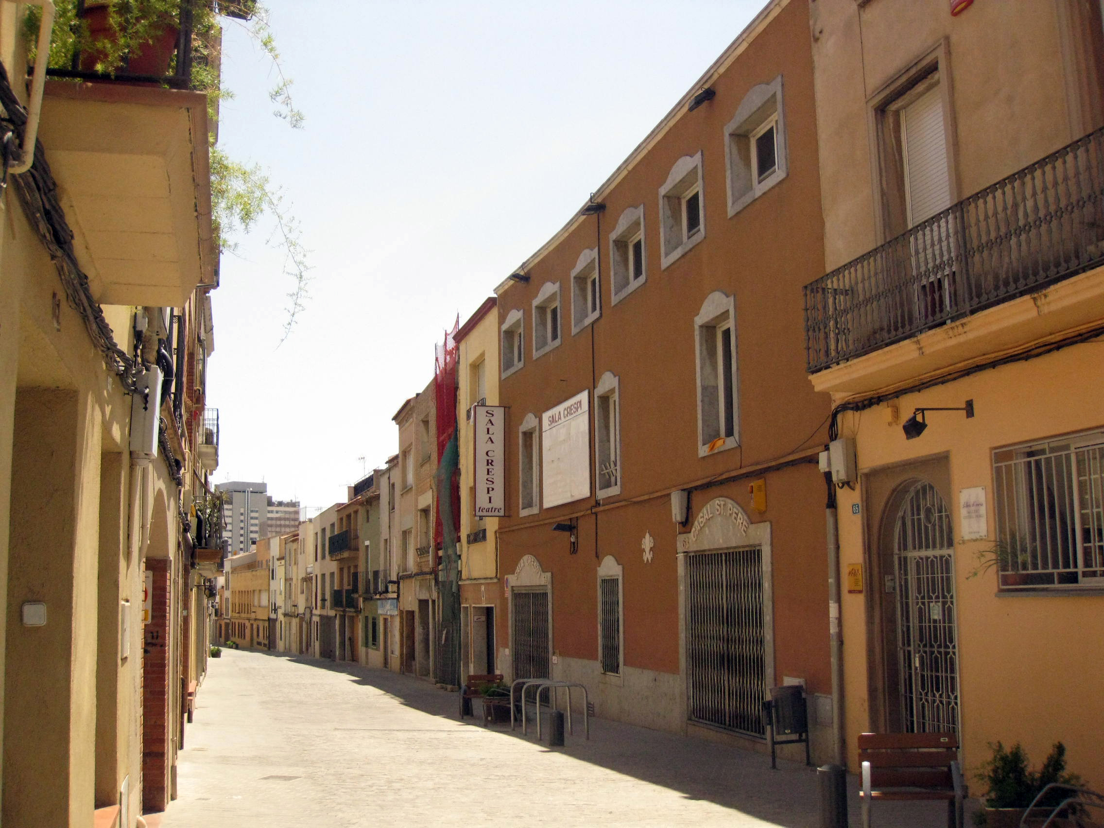 Carrer Major de Sant Pere (Terrassa)